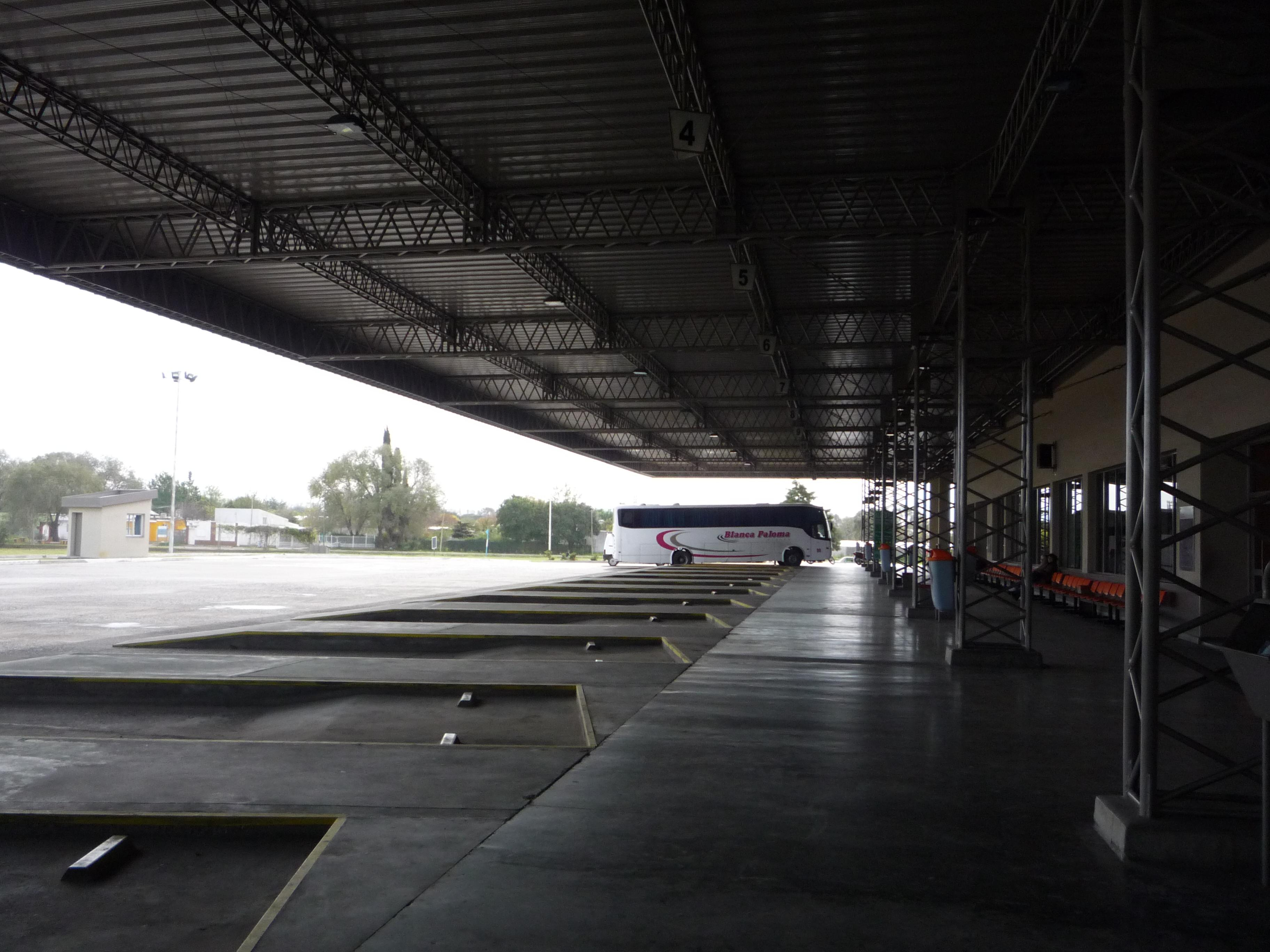 Terminal de Omnibus - Villa Mercedes - San Luis